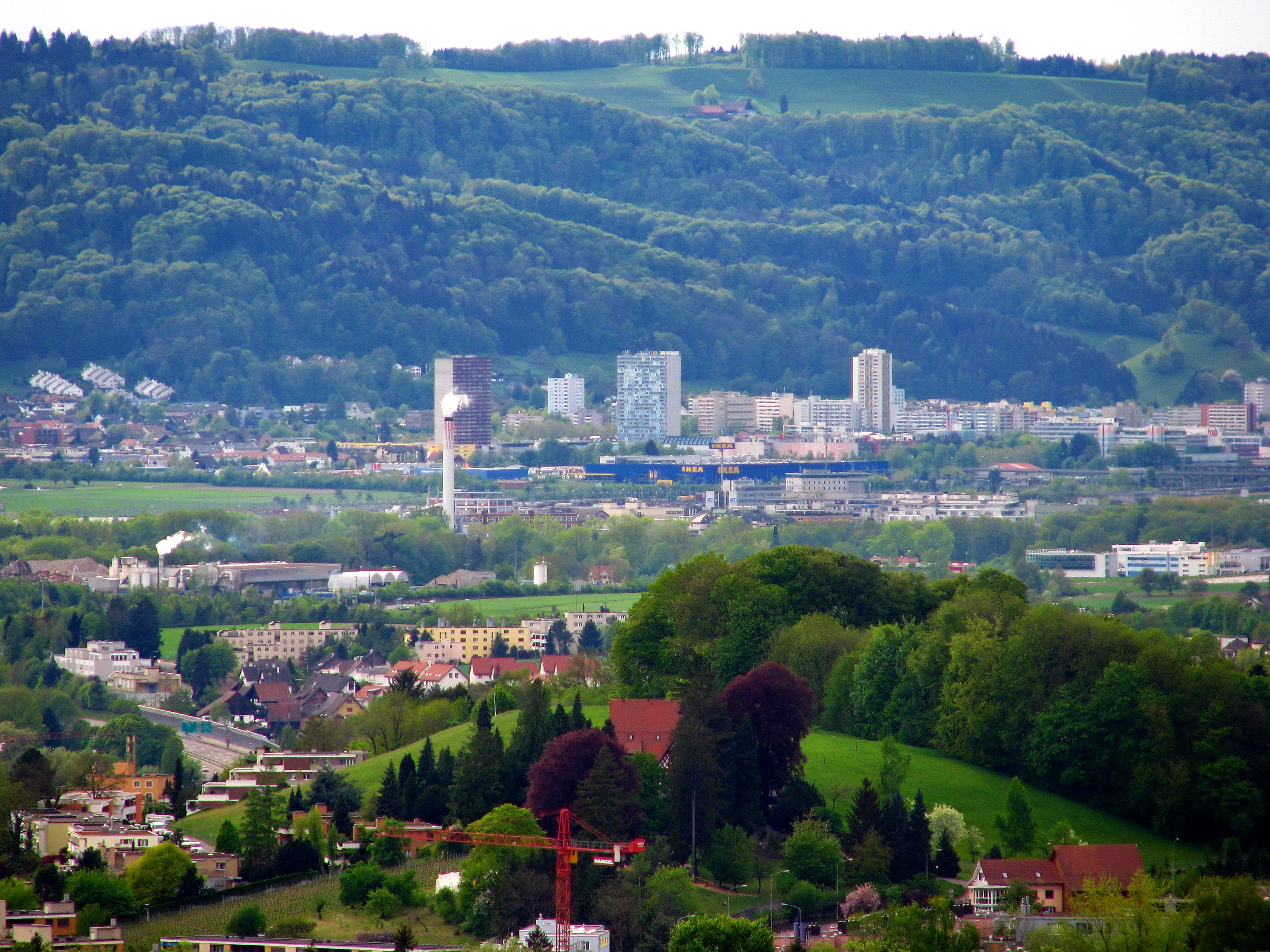 Spreitenbach in Limmtatal, seen from Käferberg-Waidberg in Zürich